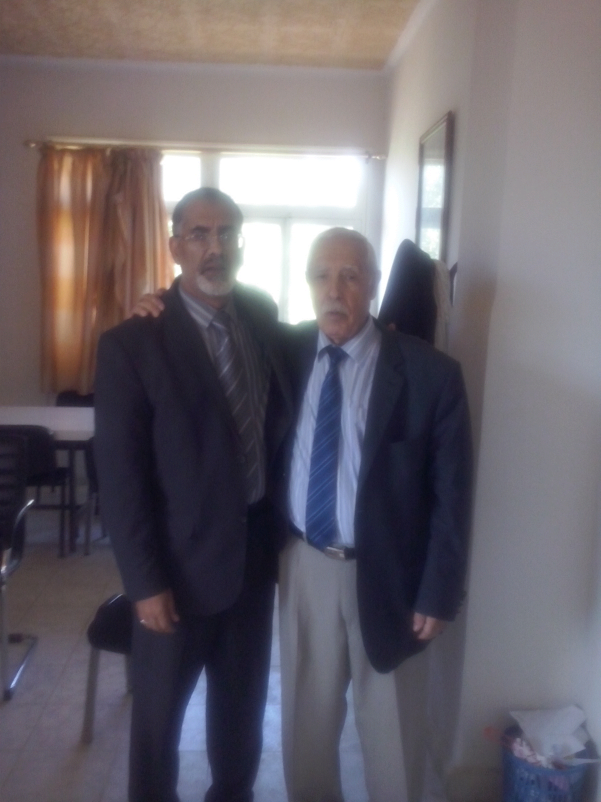 بوعزة بوضرساية رفقة ناصر الدين سعيدوني